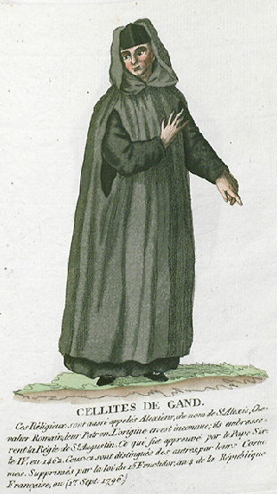 Collection de costumes de tous les ordres monastiques, supprimés à differentes époques, dans la ci-devant Belgique, Bruxelles, Philippe Joseph Maillart et sœur, 1811